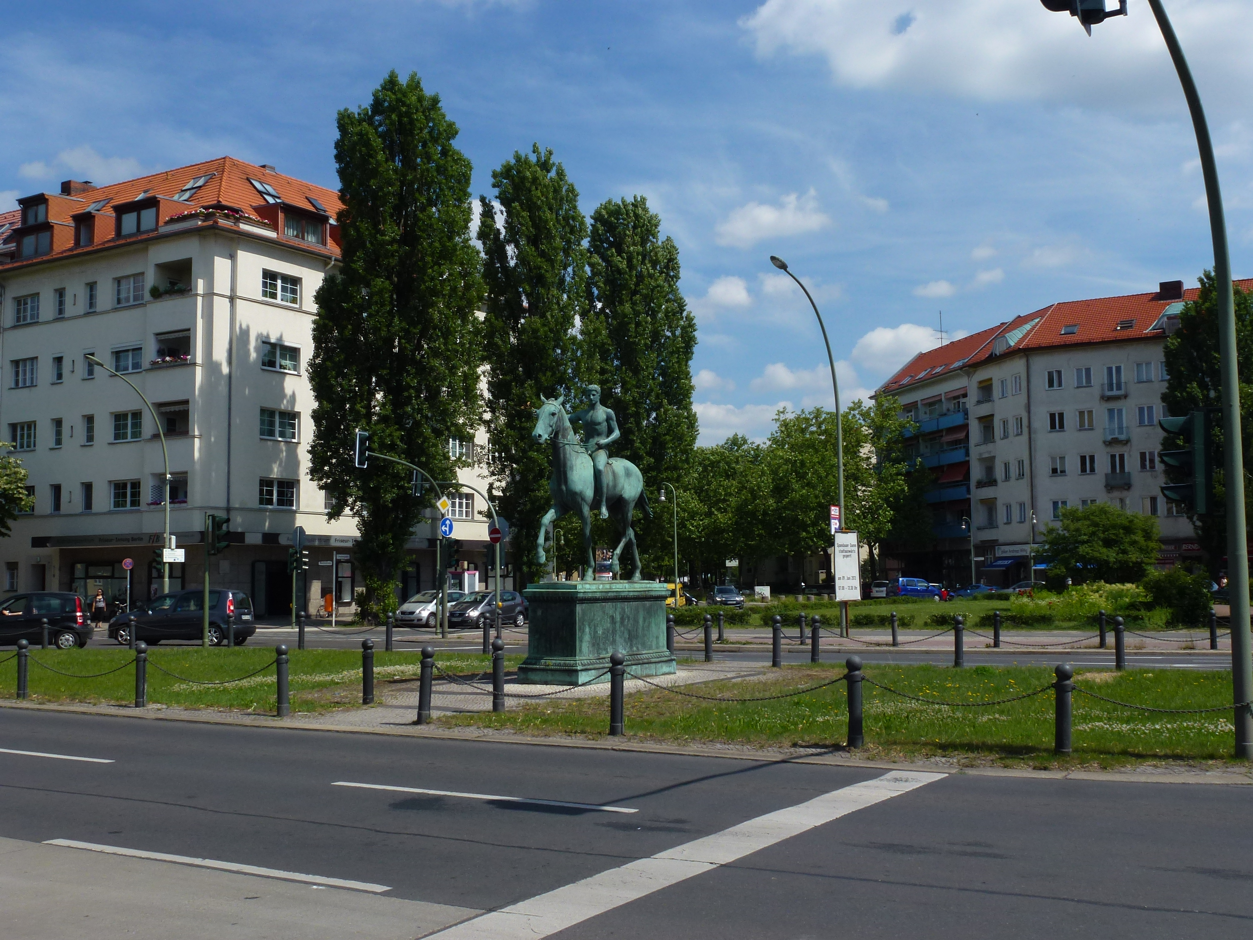 Berlin-Westend Steubenplatz